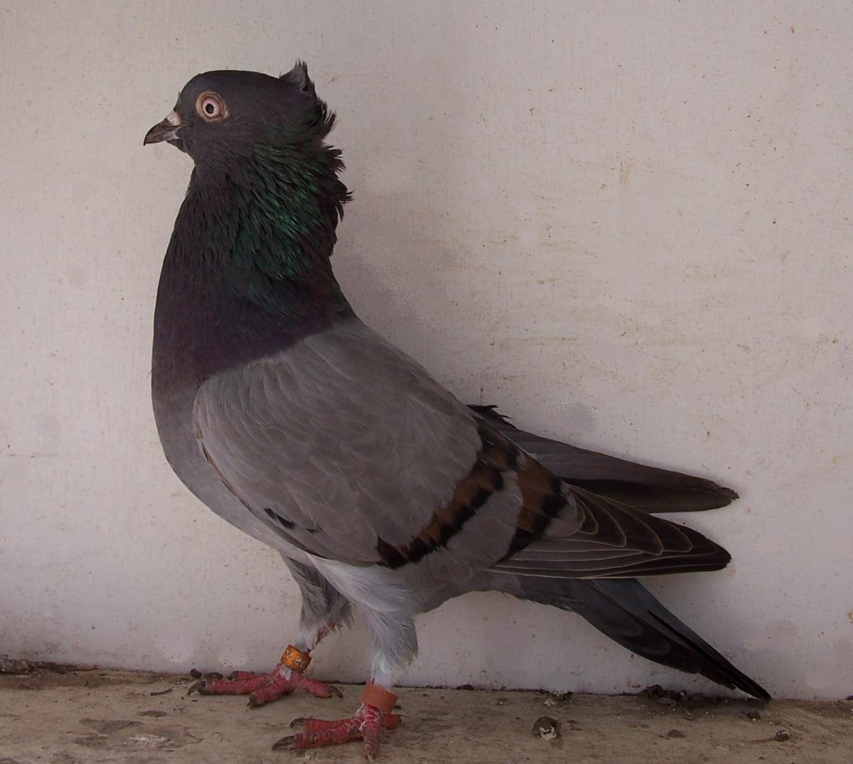 A Blue Bar Serbian Highflier Hen